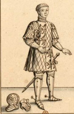 tombe de louis de beauvau_relevée pour Gaignières, conservé à la BNF.